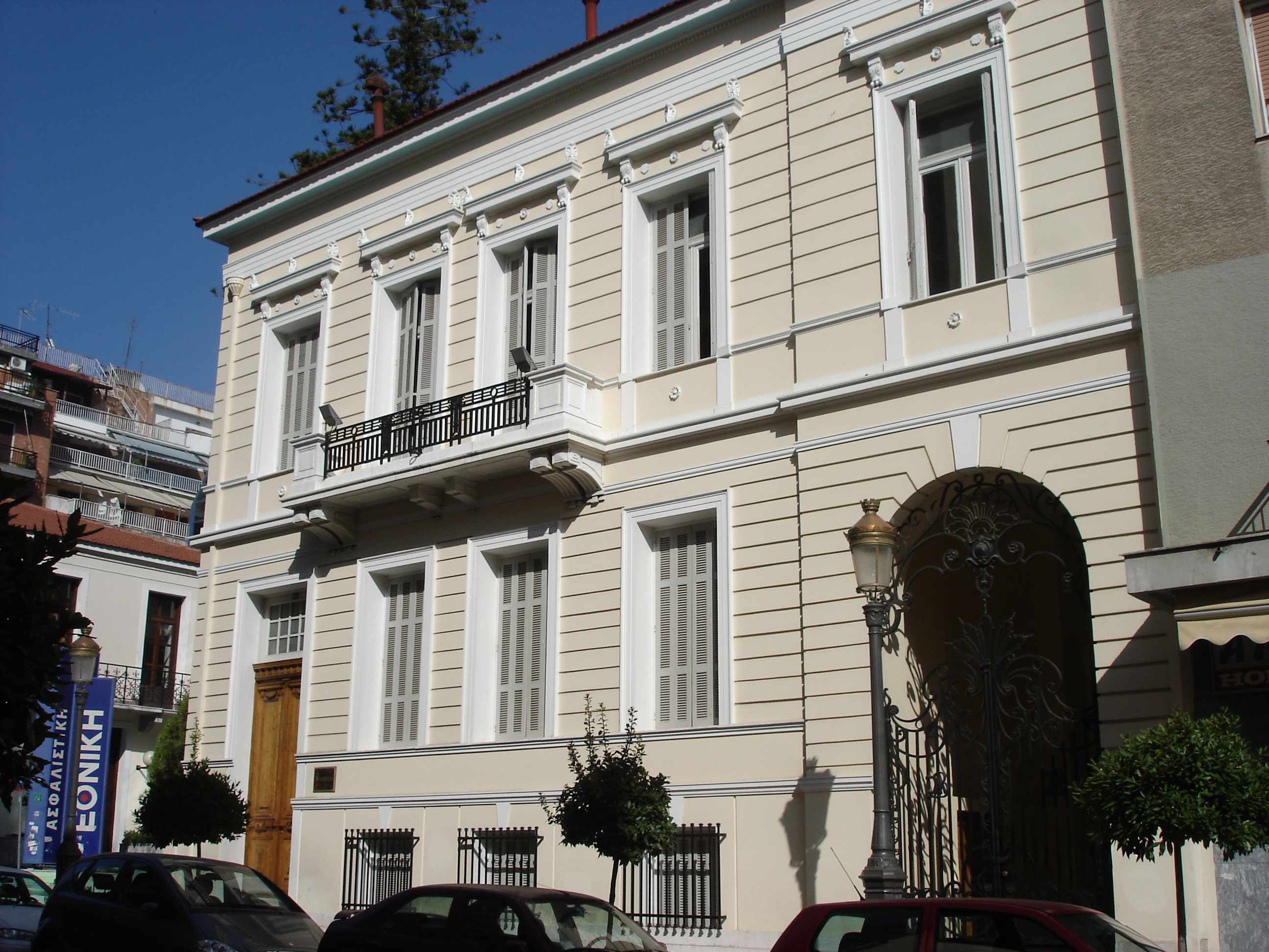 Blaxos House , Patras, Οικία Βλάχου Πάτρα